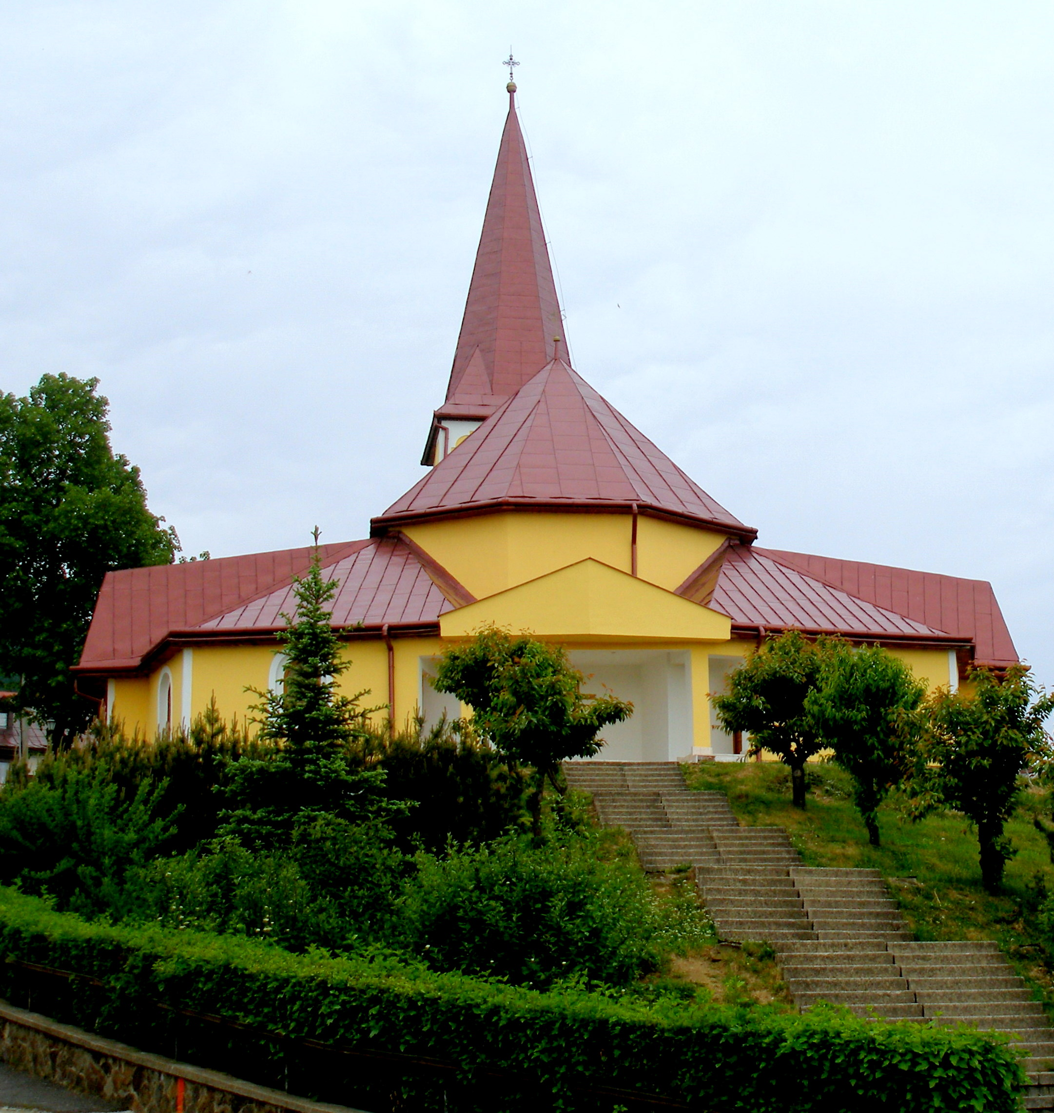 Obec Poloma okres Sabinov.